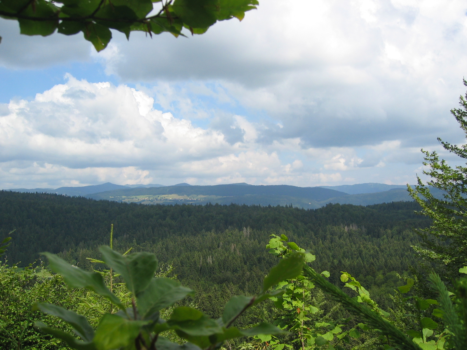 Vue sur les Monts Jura depuis un promontoire au dessus du Lac Genin